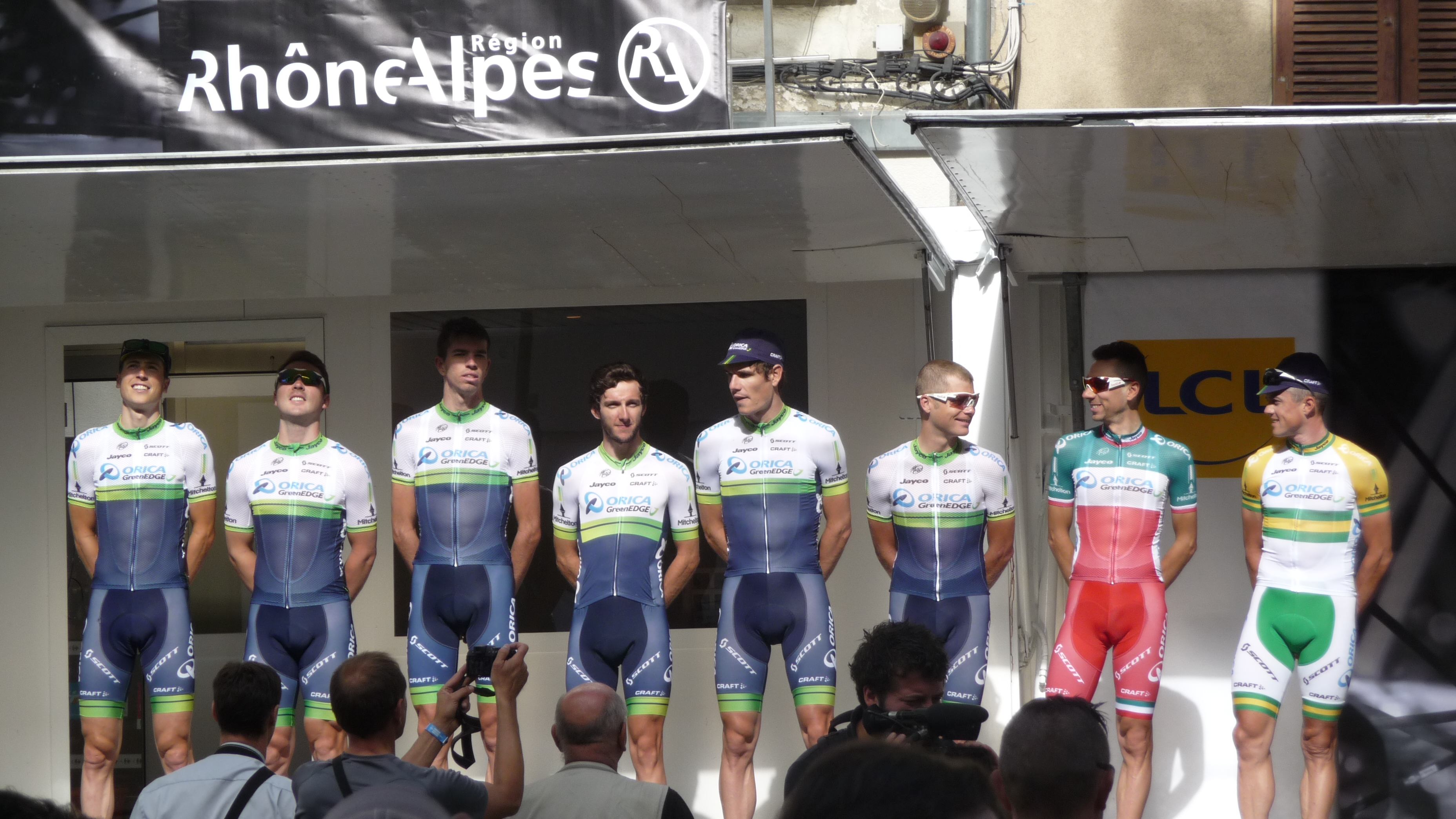 Présentation des équipes du Critérium du Dauphiné 2014 lors du départ de la 2ème étape à Tarare.